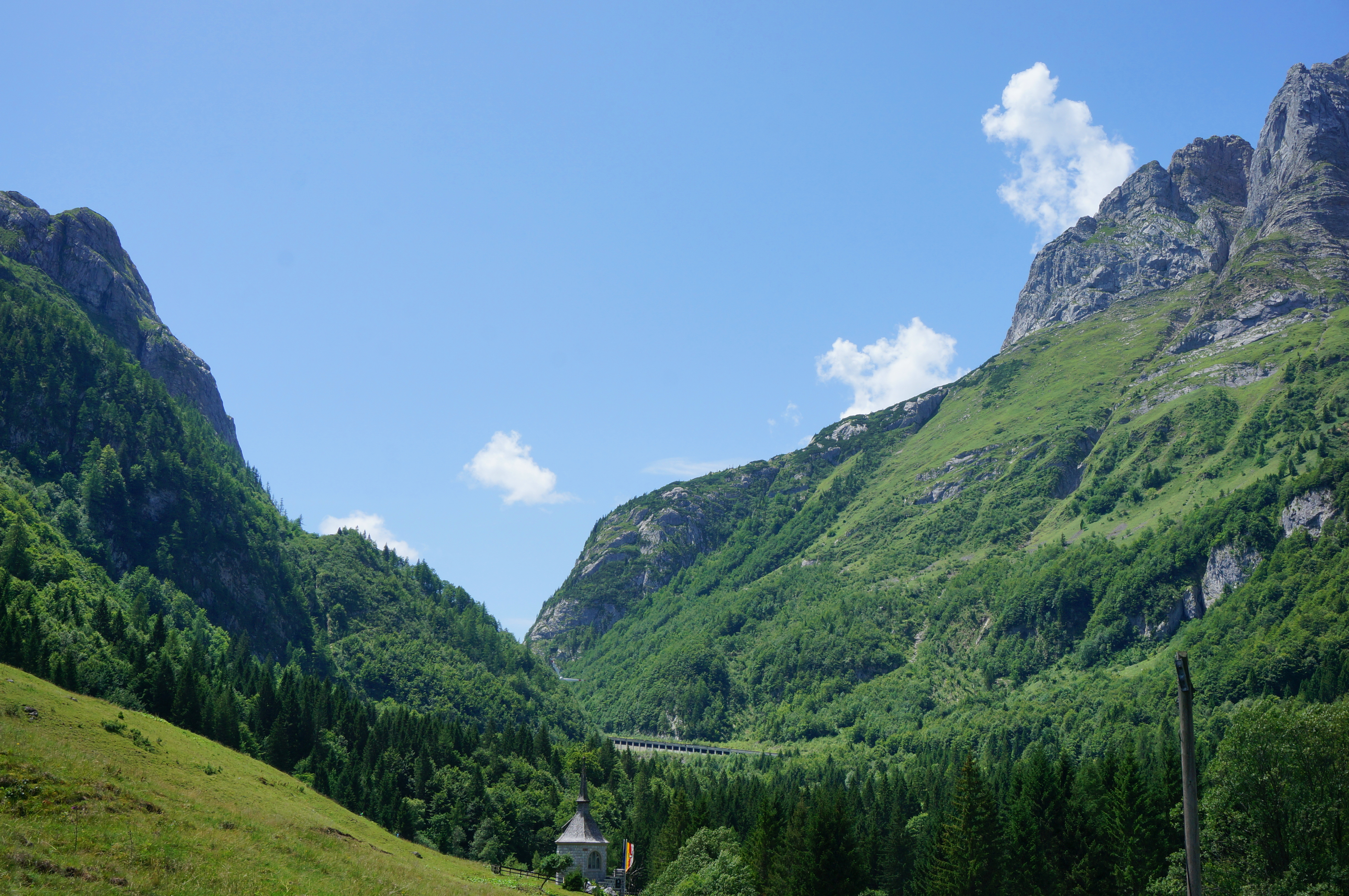 Historischer Rundweg 1915-1917, Sentiero storico mit Blick zur k.u.k. Gedächtniskapelle IR 7 und der Plöckenpass-Straße, Gemeinde Kötschach-Mauthen, Kärnten, Österreich, EU